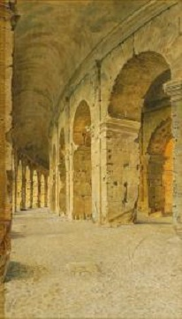 "Galleria del Colosseo, acquarello su carta, 62 x 37 cm., firmato